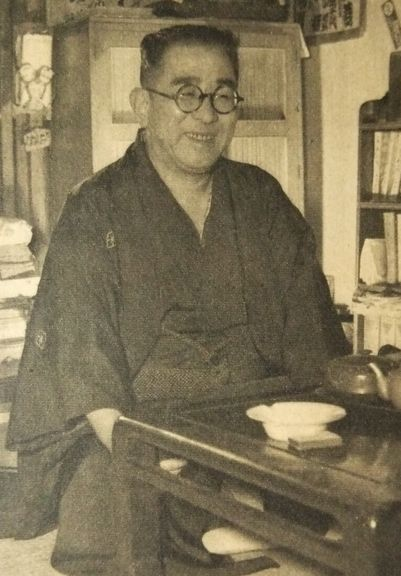 三代目桃川如燕（後の五代目神田伯山）